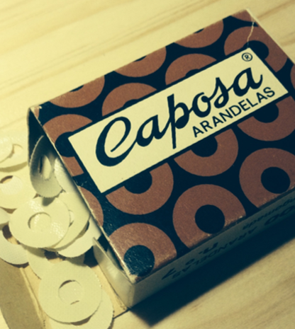 Primeras arandelas adhesivas fabricadas por APLI